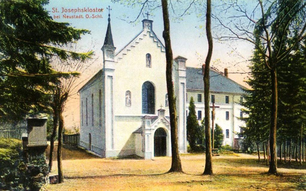 Widok z klasztoru Braci Alkantrystów od strony północnej. Tu w latach 1954-1955 więziony był kardynał Stefan Wyszyński.